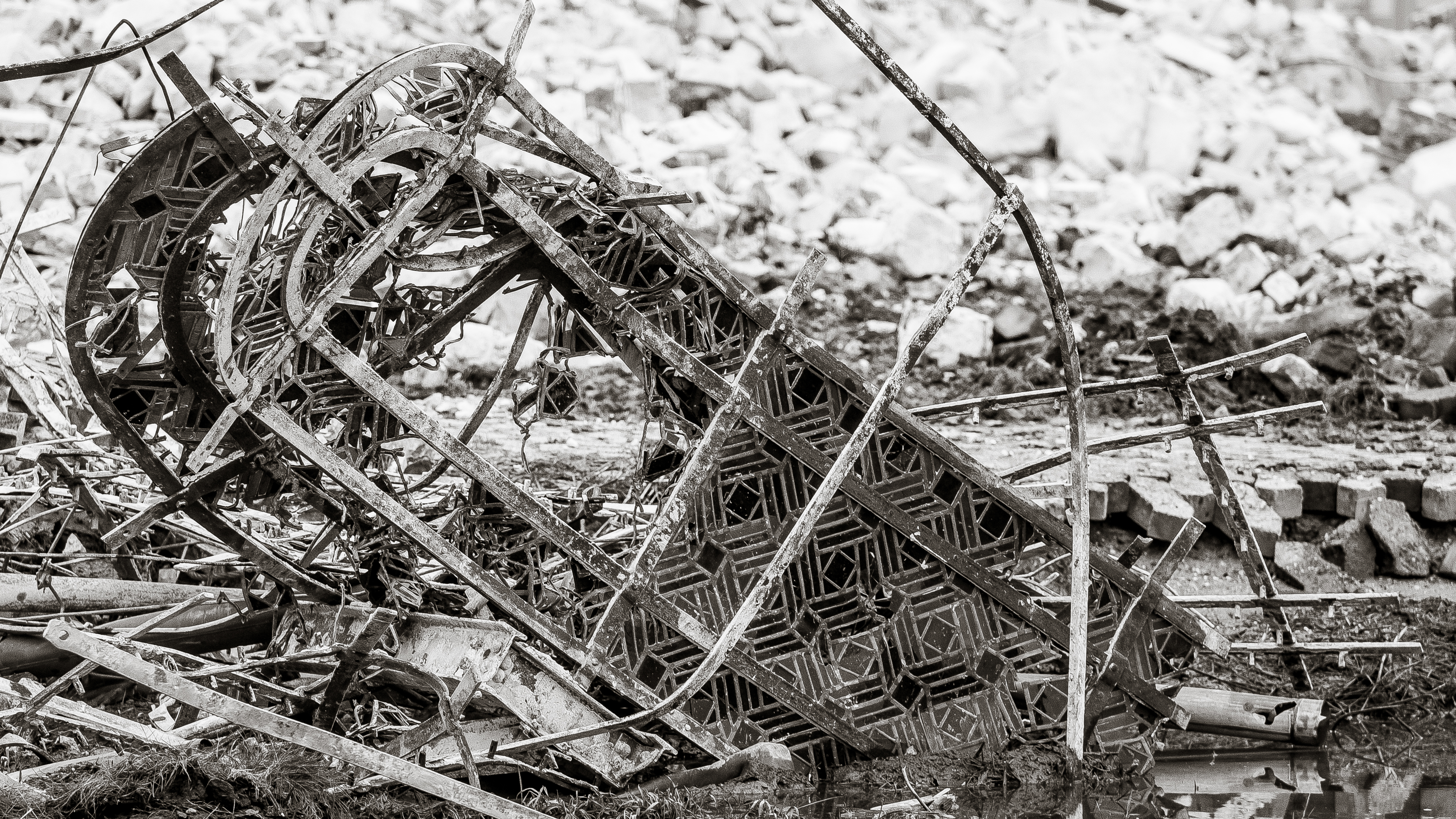 Abriss Immerather Dom, St. Lambertus: Zerstörtes Obergaden-Fenster von Anton Wolff (1975/76)